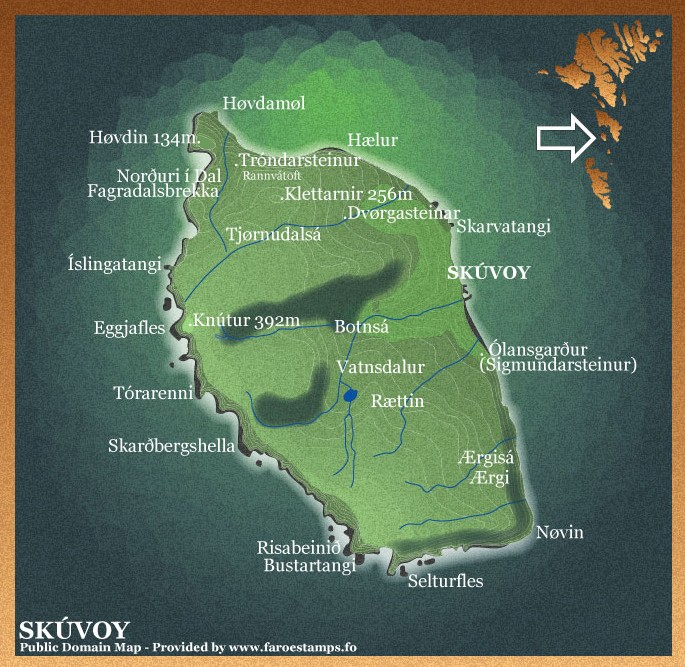 Skúvoy, Faroe Islands